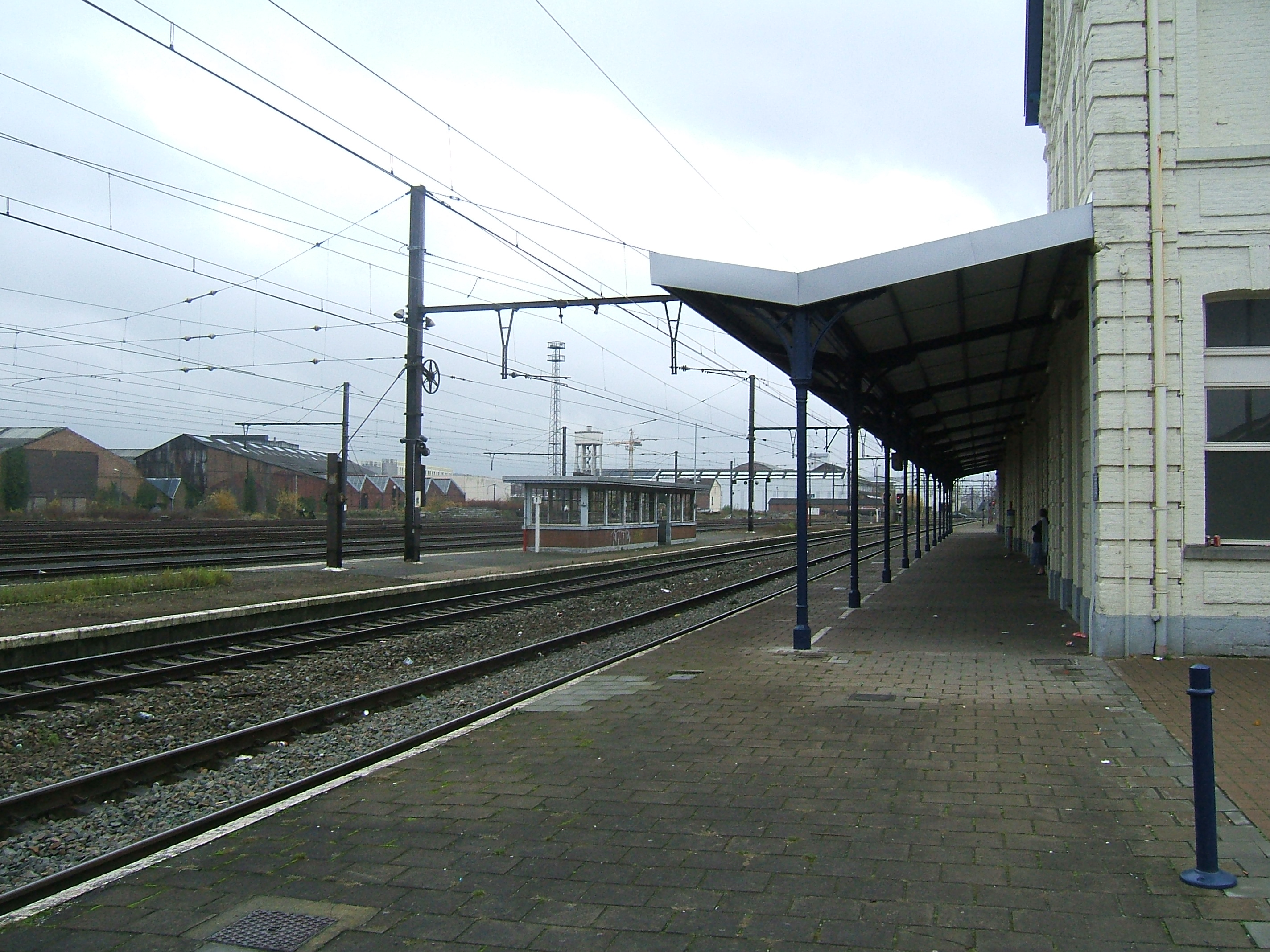 Intérieur de la gare d'Erquelinnes en Belgique